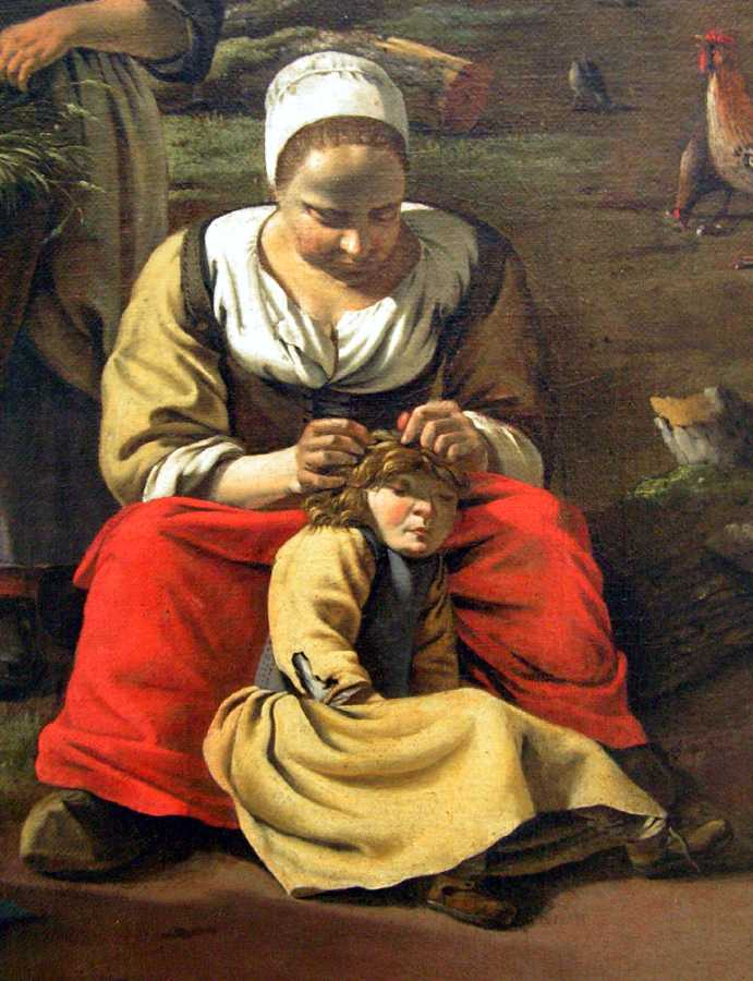 Scène d'épouillage. Détail d'un tableau de Jan Siberechts, Cour de ferme